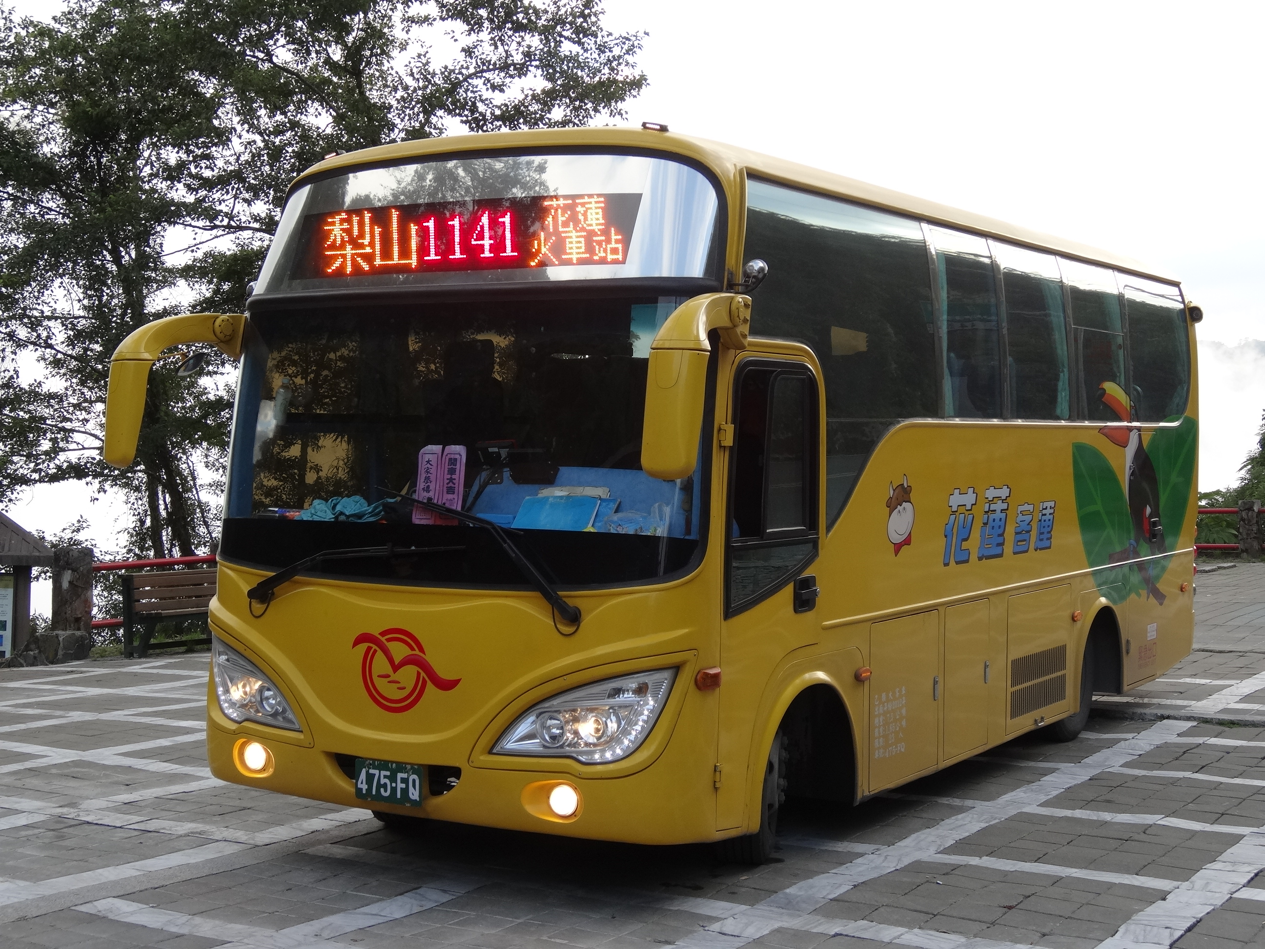 花蓮客運475-FQ 1141梨山→花蓮